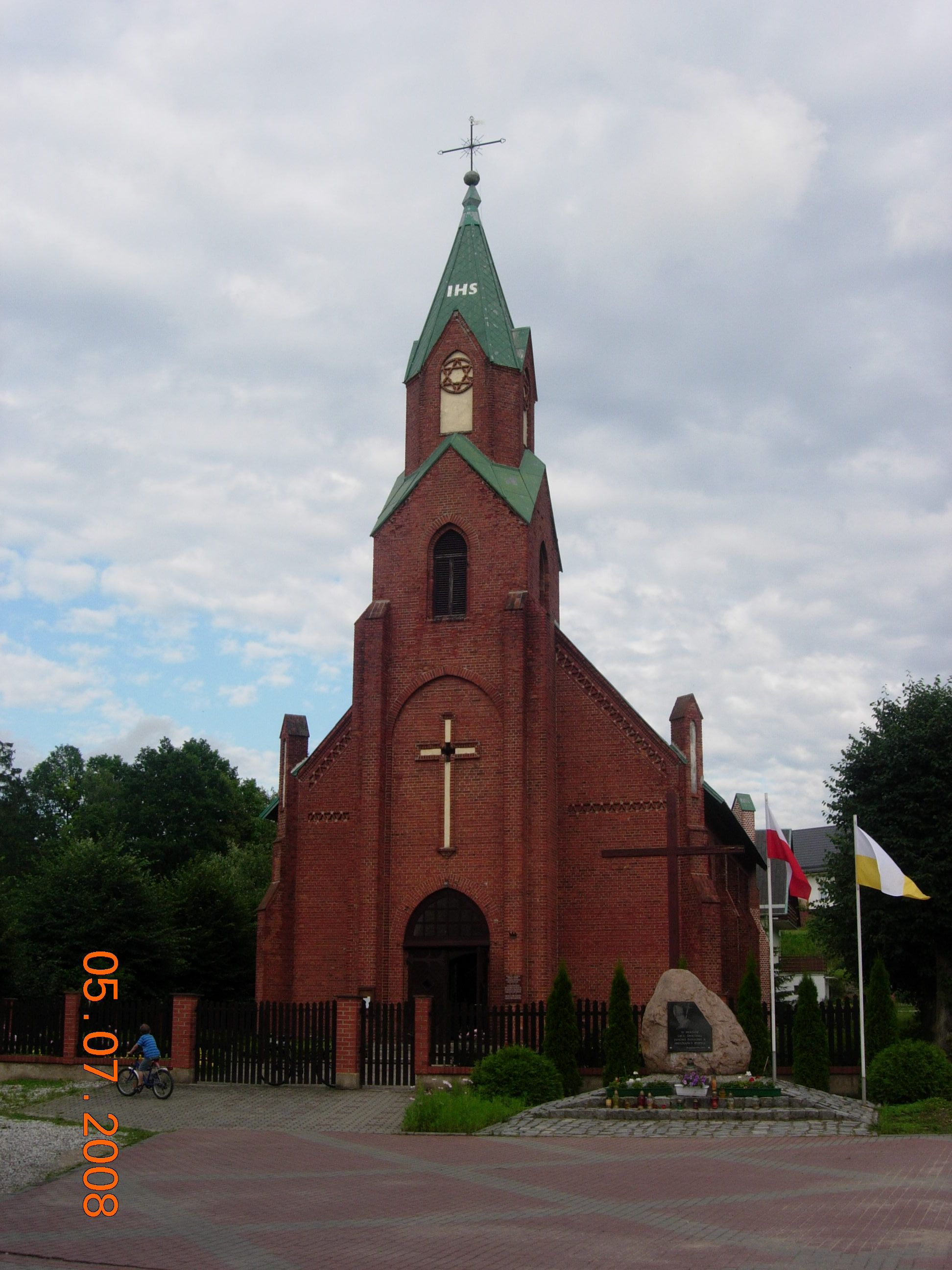 Ryjewo - Kościół parafialny bł. Michała Kozala